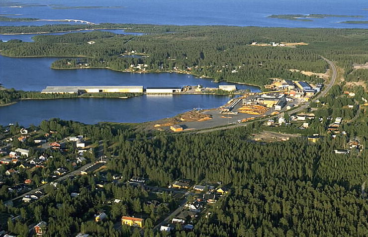 Motiv: Seskarö Nyckelord: Flygbilder, Riksintressen Kategori: SågverkssamhälleSeskarö